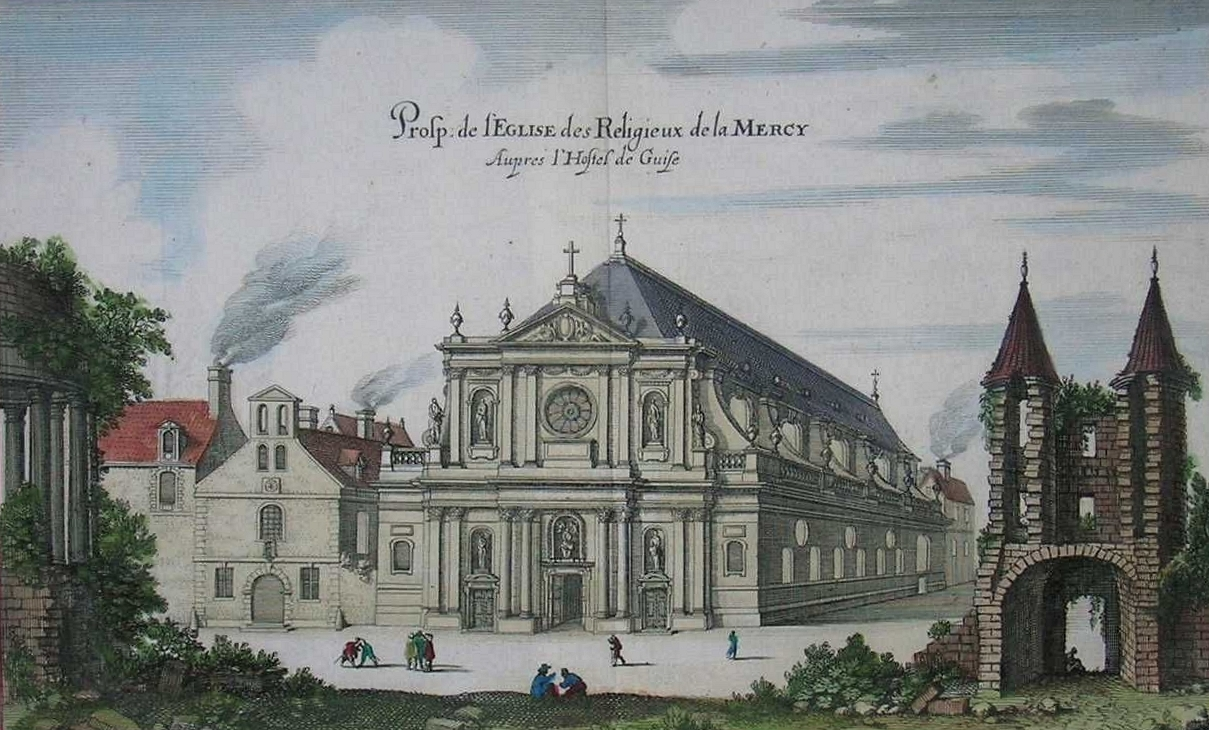 Eglise des Religieux de la Mercy